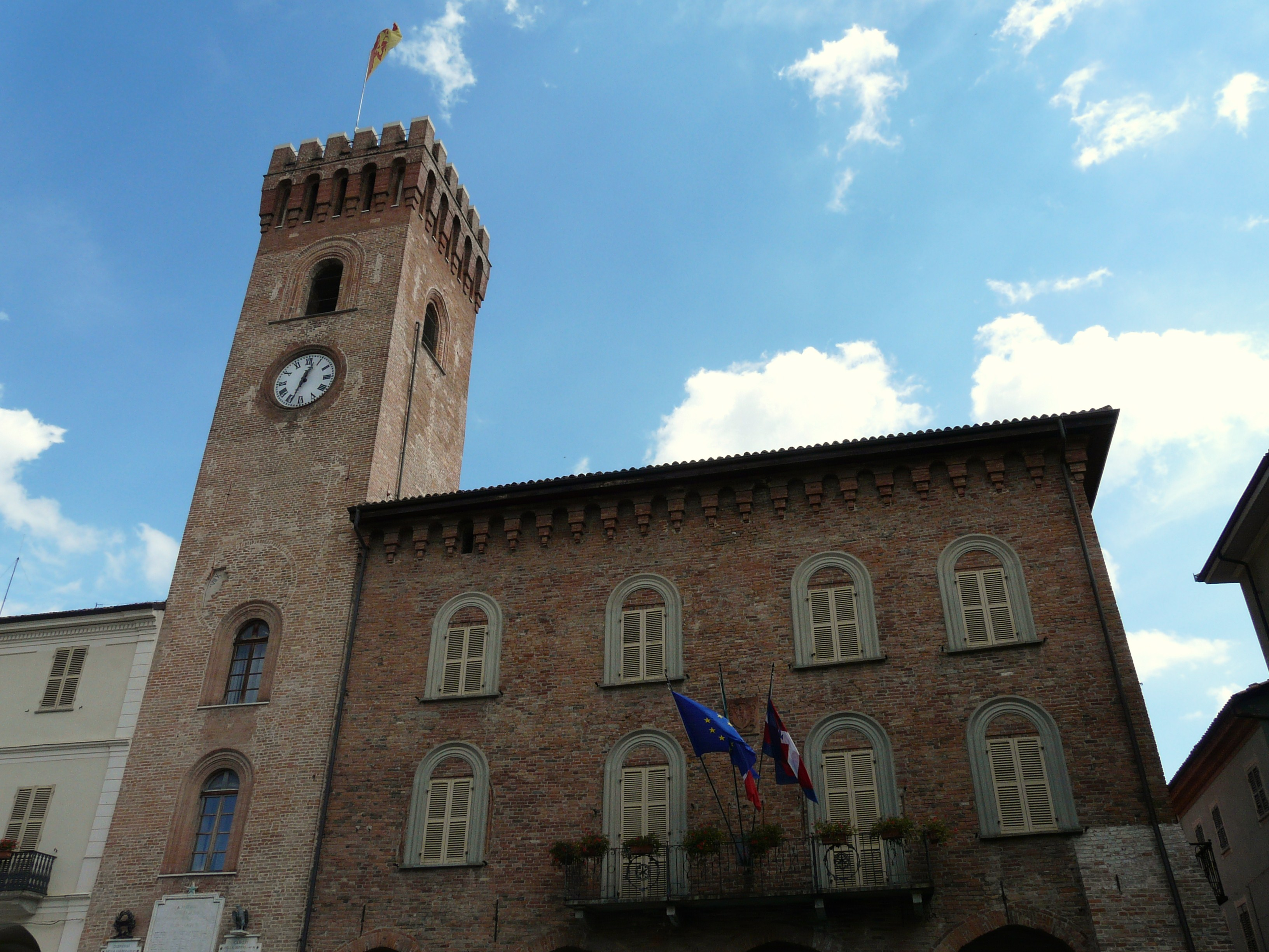 Municipio di Nizza Monferrato, Piemonte, Italia